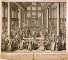 THE DEDICATION OF THE PORTUGUESE JEWS SINAGOGUE AT AMSTERDAM. A. the Hechal where the books of the Law are kept. B. Thelba or desk where the Hazan and Hacham read the Law. C. Galerys for the women. The dedication of the synagogue and the Entring of the books of the Law are celebrated during the space of 8 days, upon the 10th of the month Menahem 5435. which answers to our month of August 1675. They constantly make an annual commemoration of it.